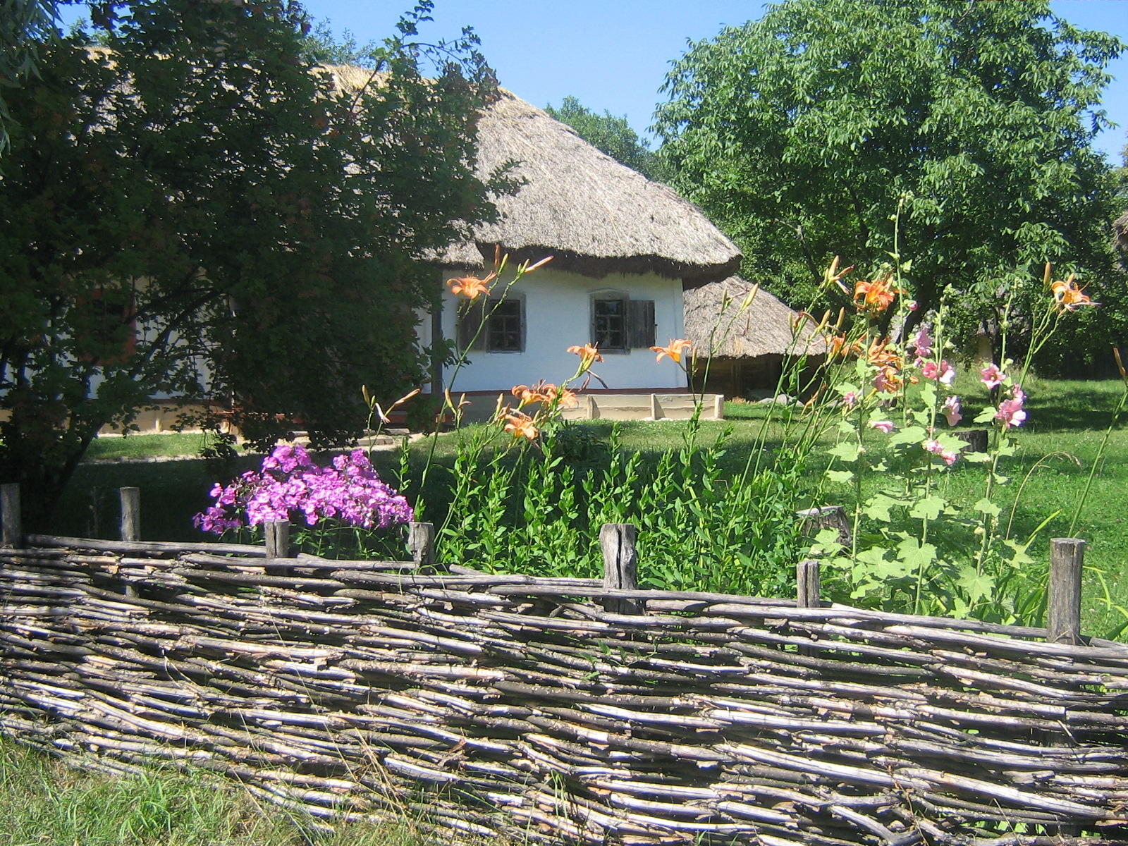 Національний музей народної архітектури і побуту України (с. Пирогів), Київ, Червонопрапорна вул., с. Пирогів